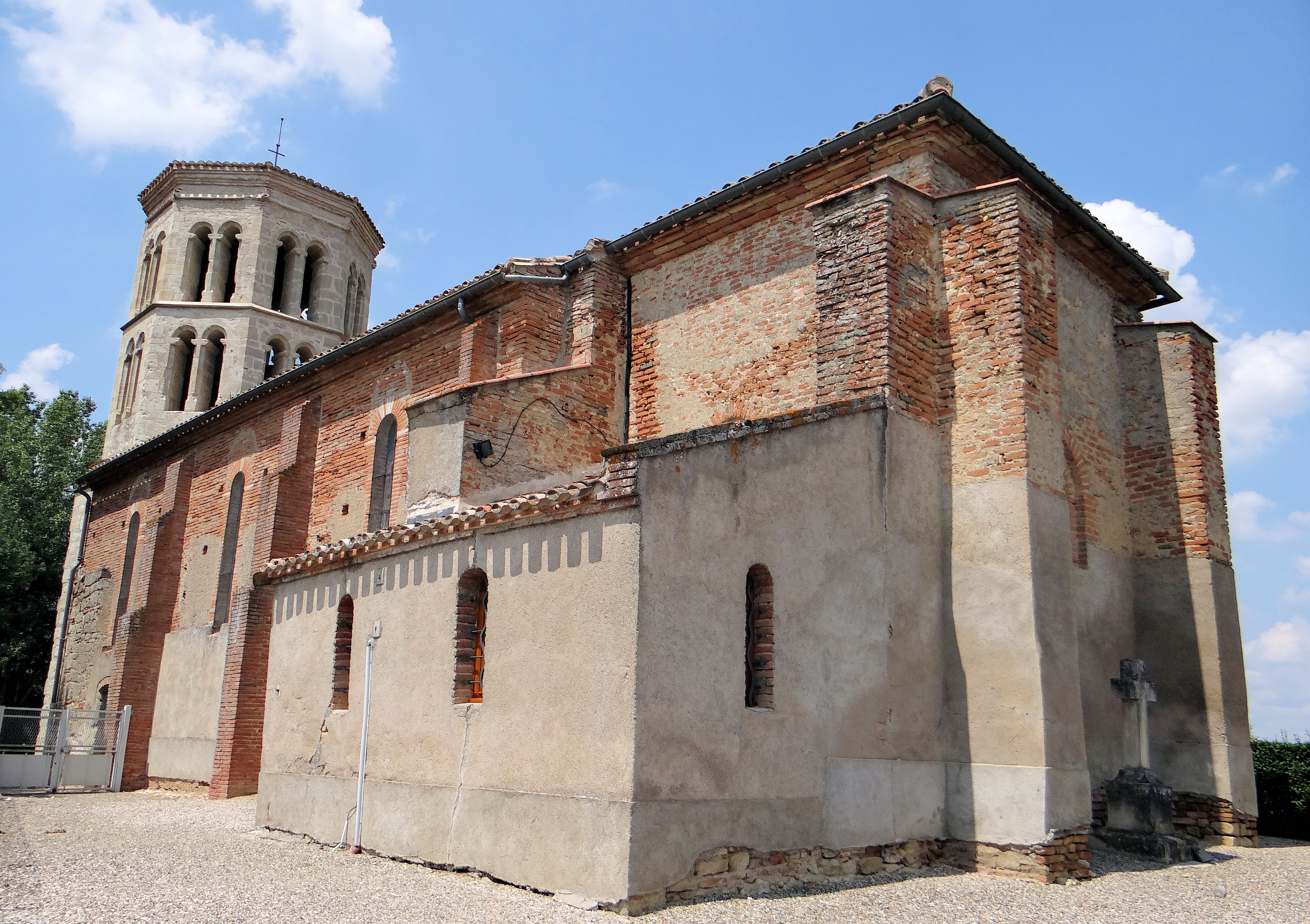 Mirabel - Église Notre-Dame-des Misères - Vue du chevet